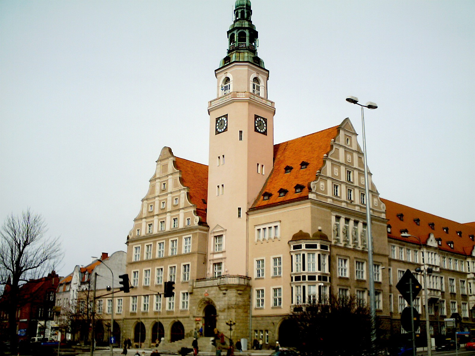 Rathaus Allenstein (Olstyn, Polen)